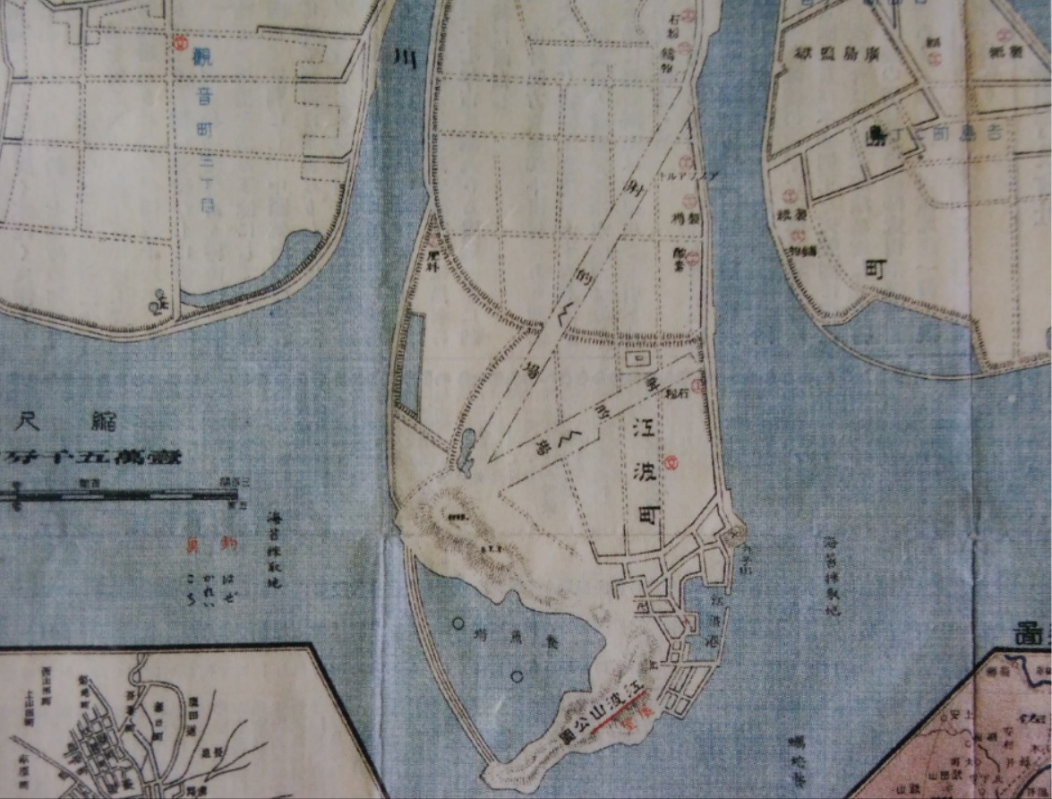 広島市中区の江波の古地図